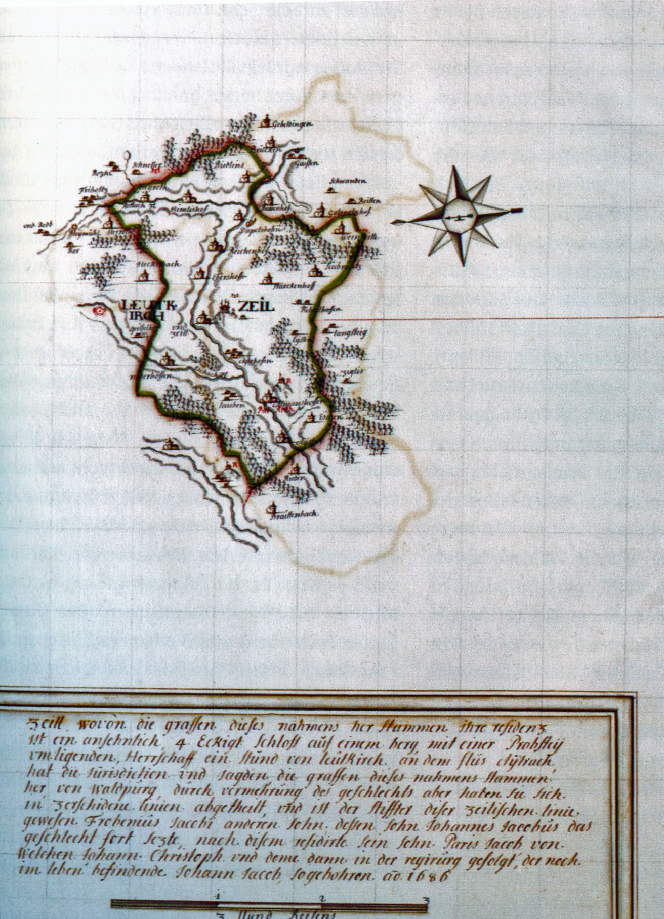 Die Herrschaft Zeil der Grafen von Waldburg-Zeil Kollorierte Zeichnung